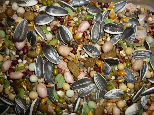 Thức ăn